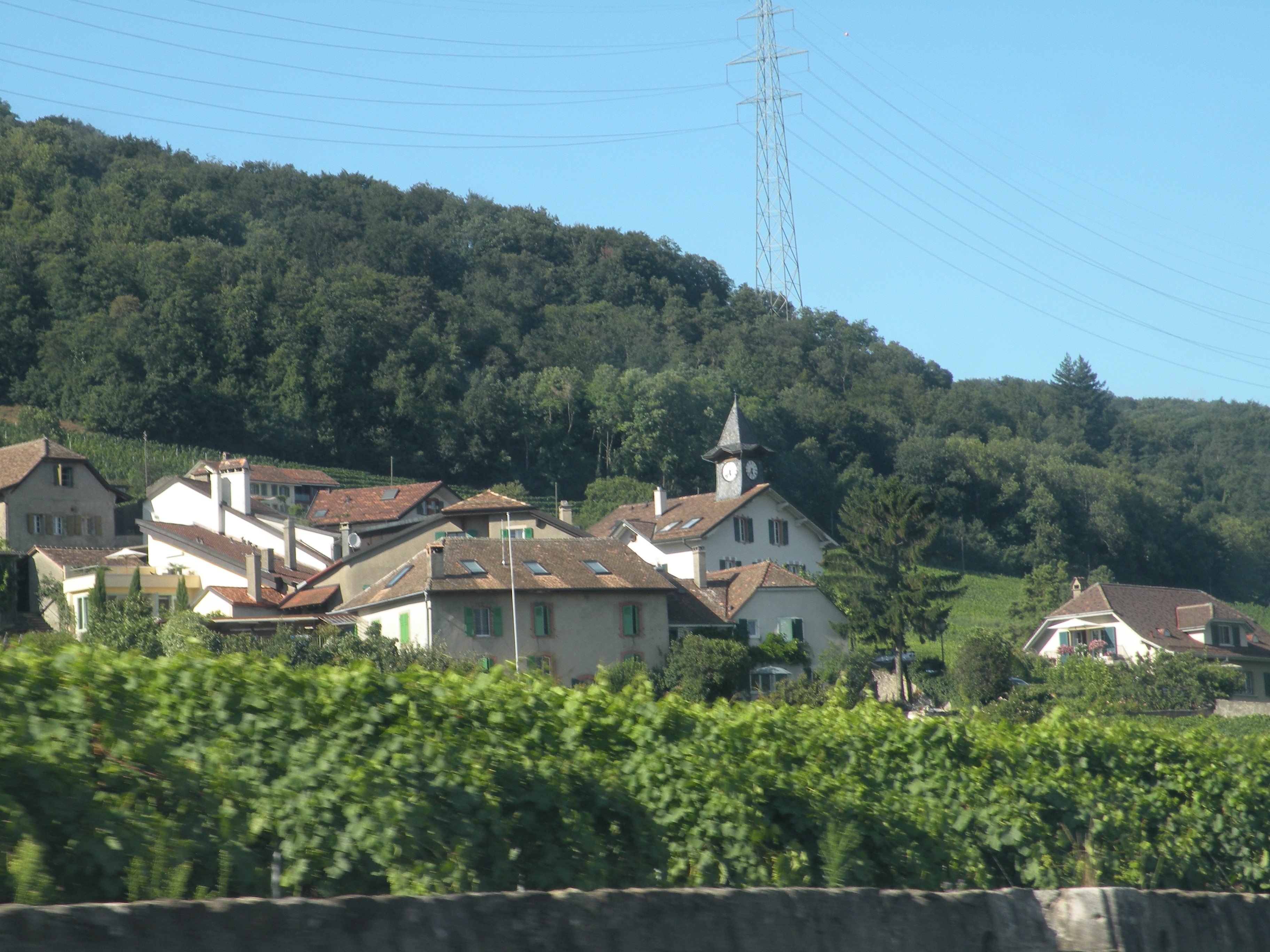 Le village de Vinzel, vu de la route du Vignoble.